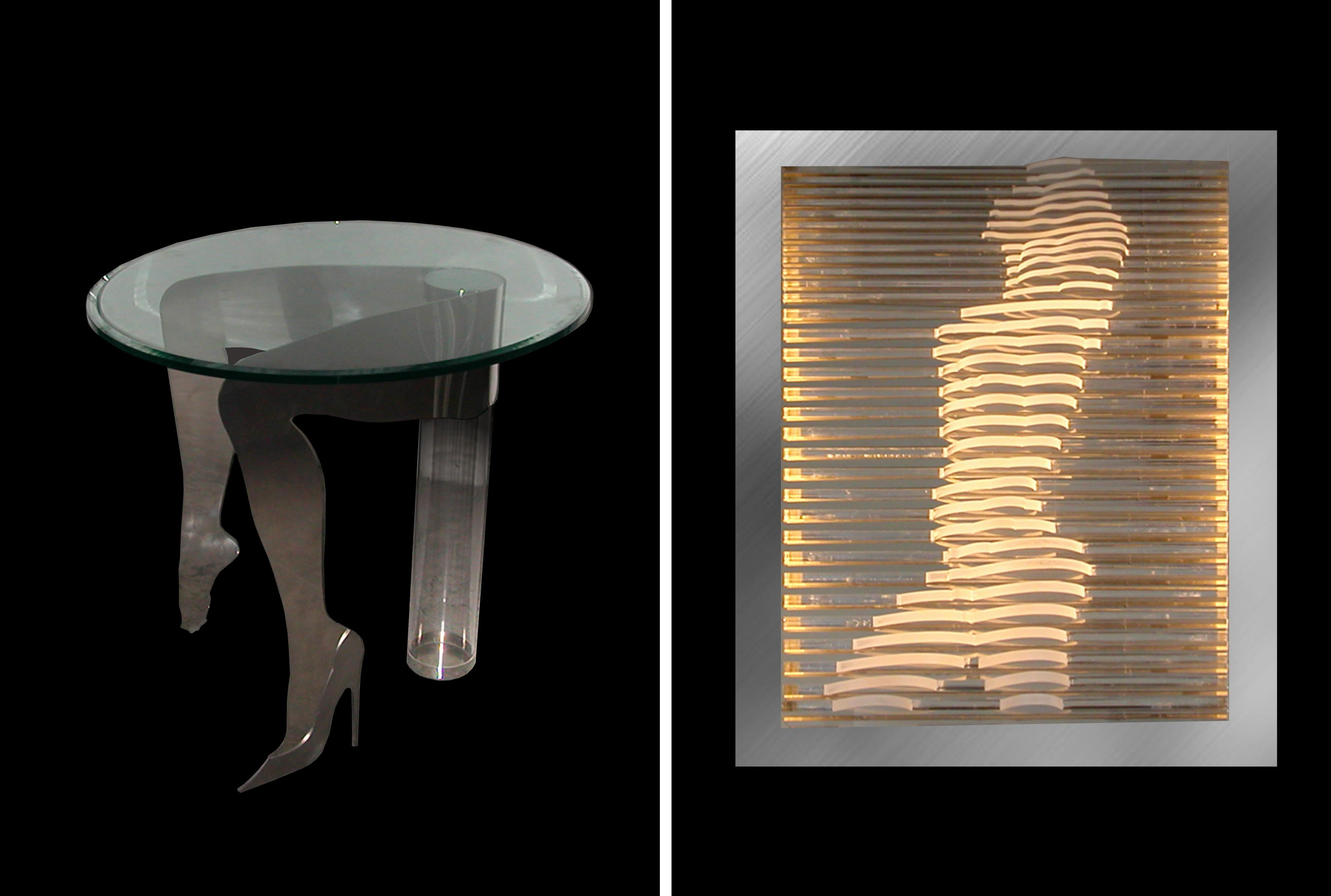 Gamba sotto il Tavolo (opera in acciaio singola o doppia con funzione di ripiano) Piacere (opera in plex, acciaio su legno e luce) Opere di Oreste Ruggiero